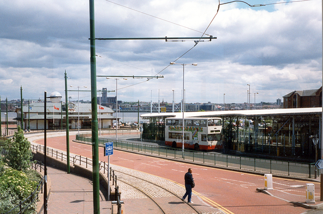 Woodside, Birkenhead